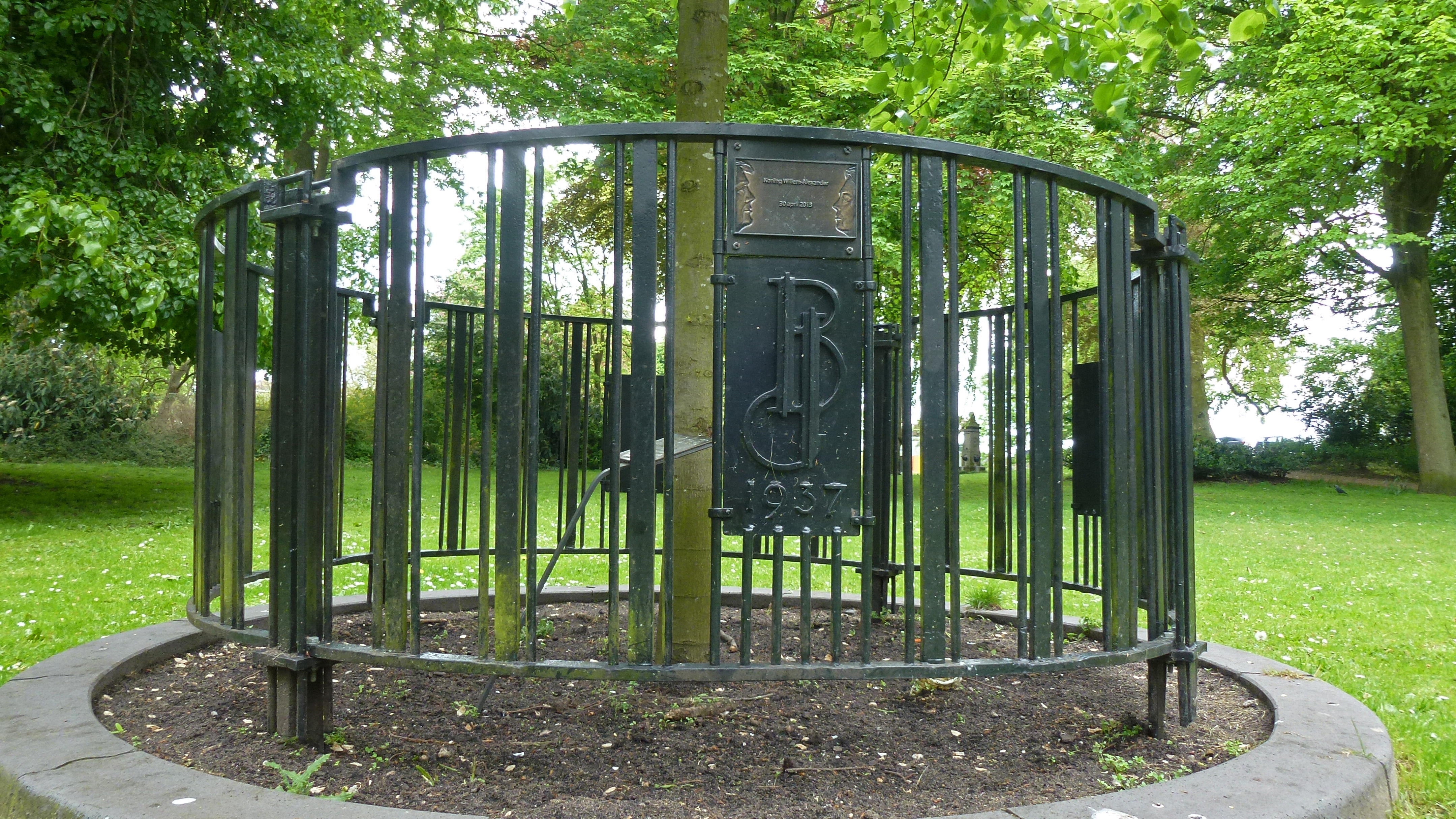 Lindeboom